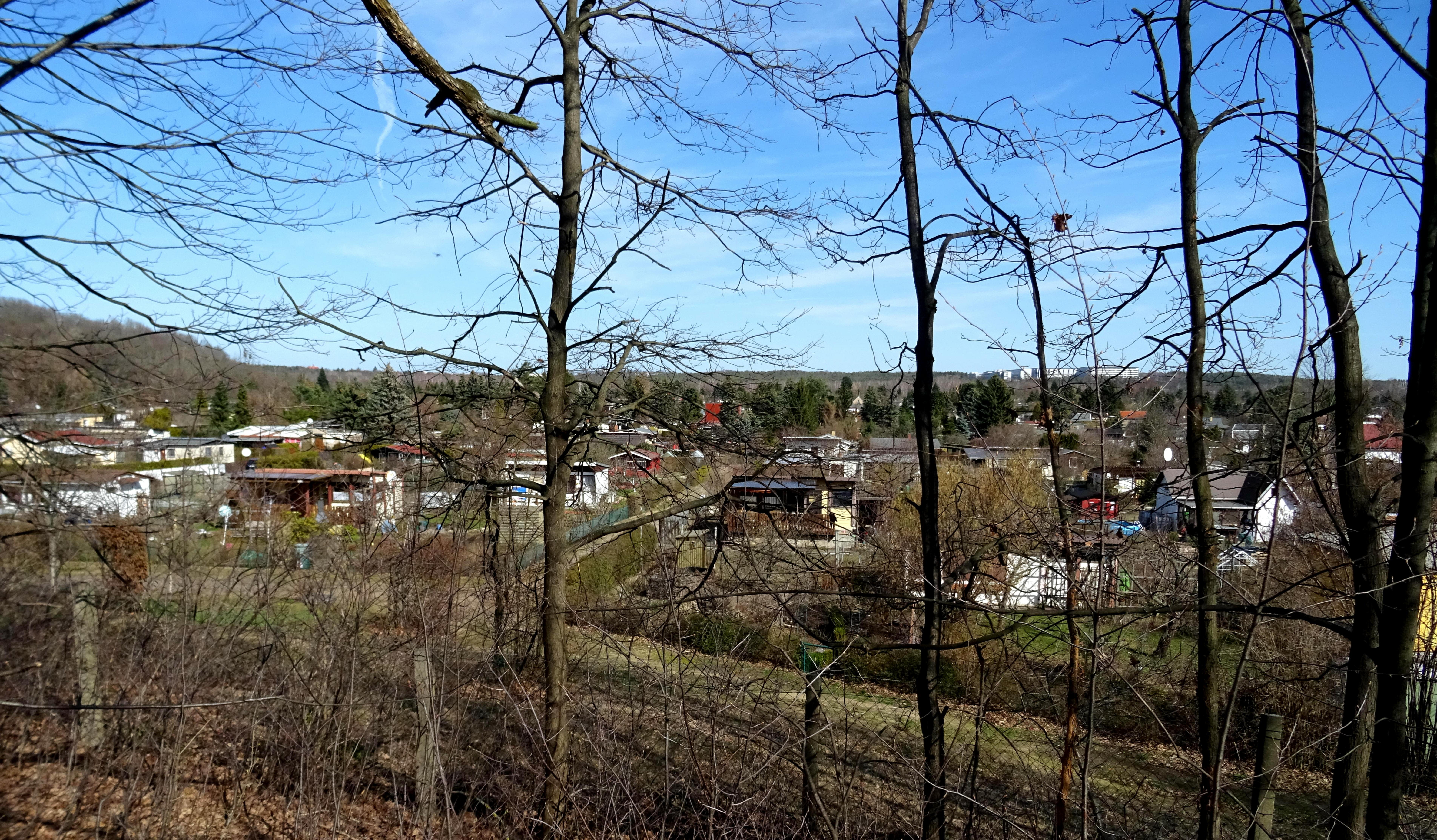 Hellerberge, Hellersiedlung am 16. März 2019